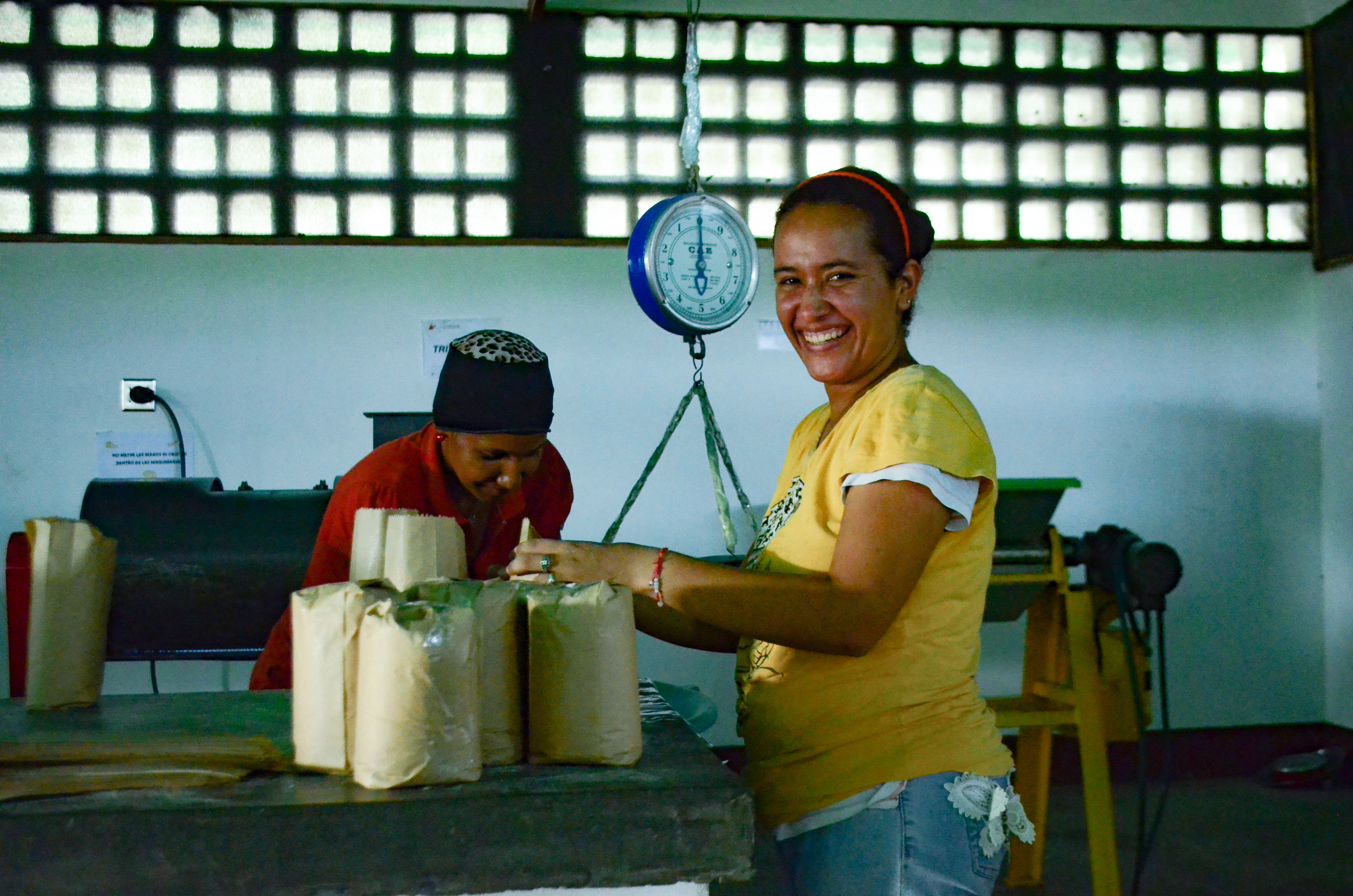 Mujer trabajadora en planta procesadora de harina de maíz. Yaguaraparo, Estado Sucre, Venezuela